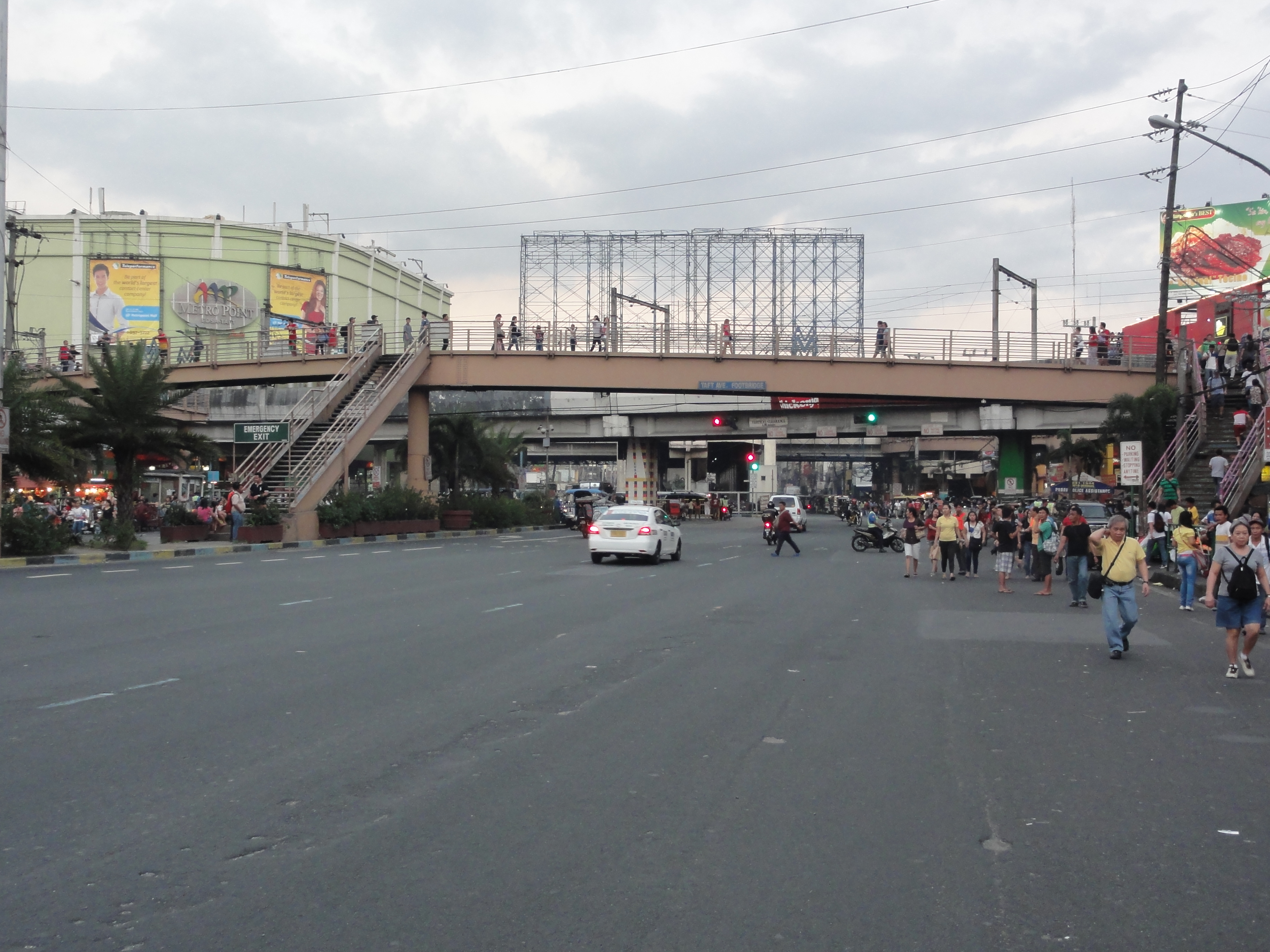 Pasay Rotonda along EDSA, Pasay City